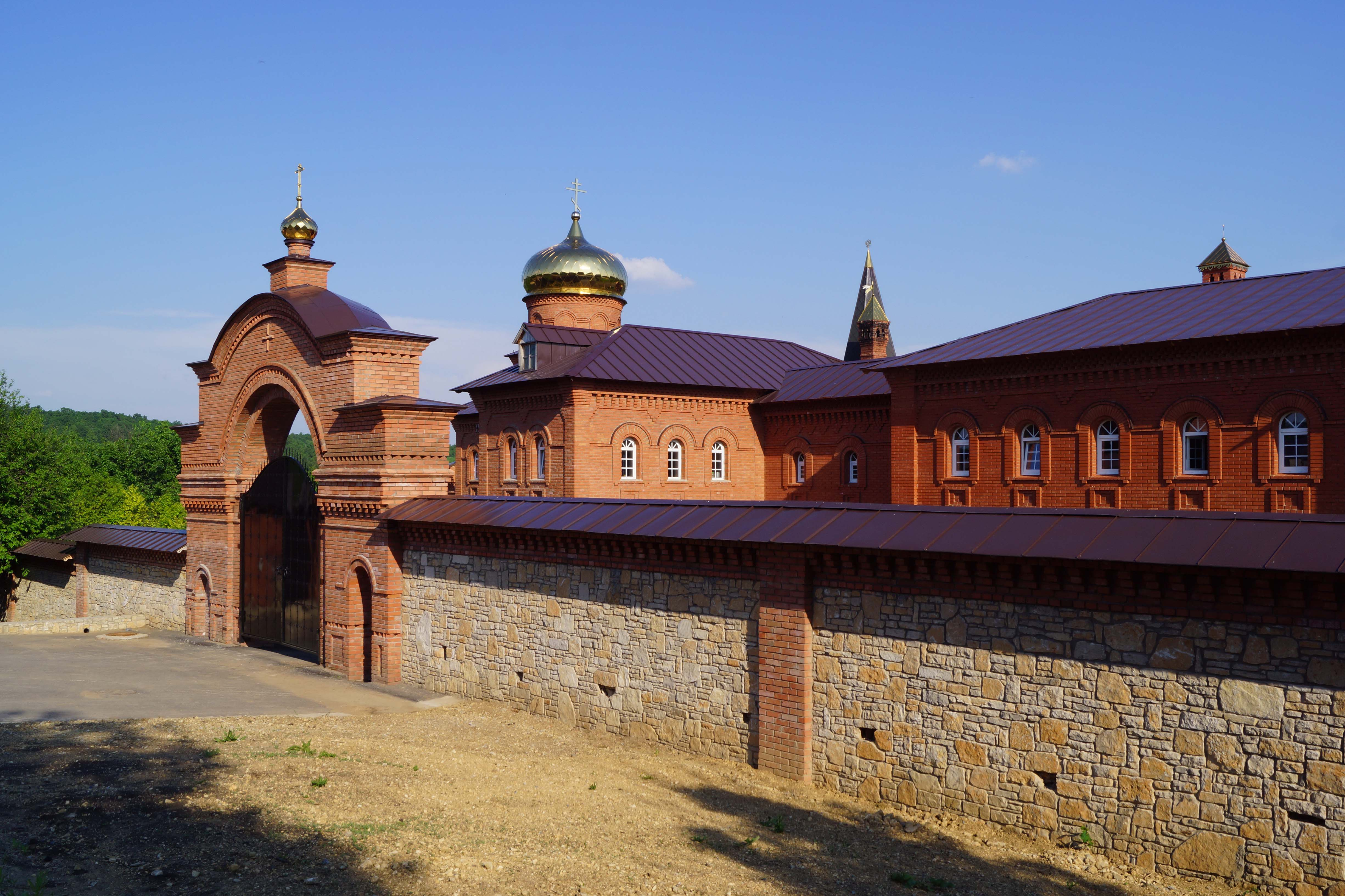 На снимке видна трапезная церковь иконы Божией Матери "Достойно есть"